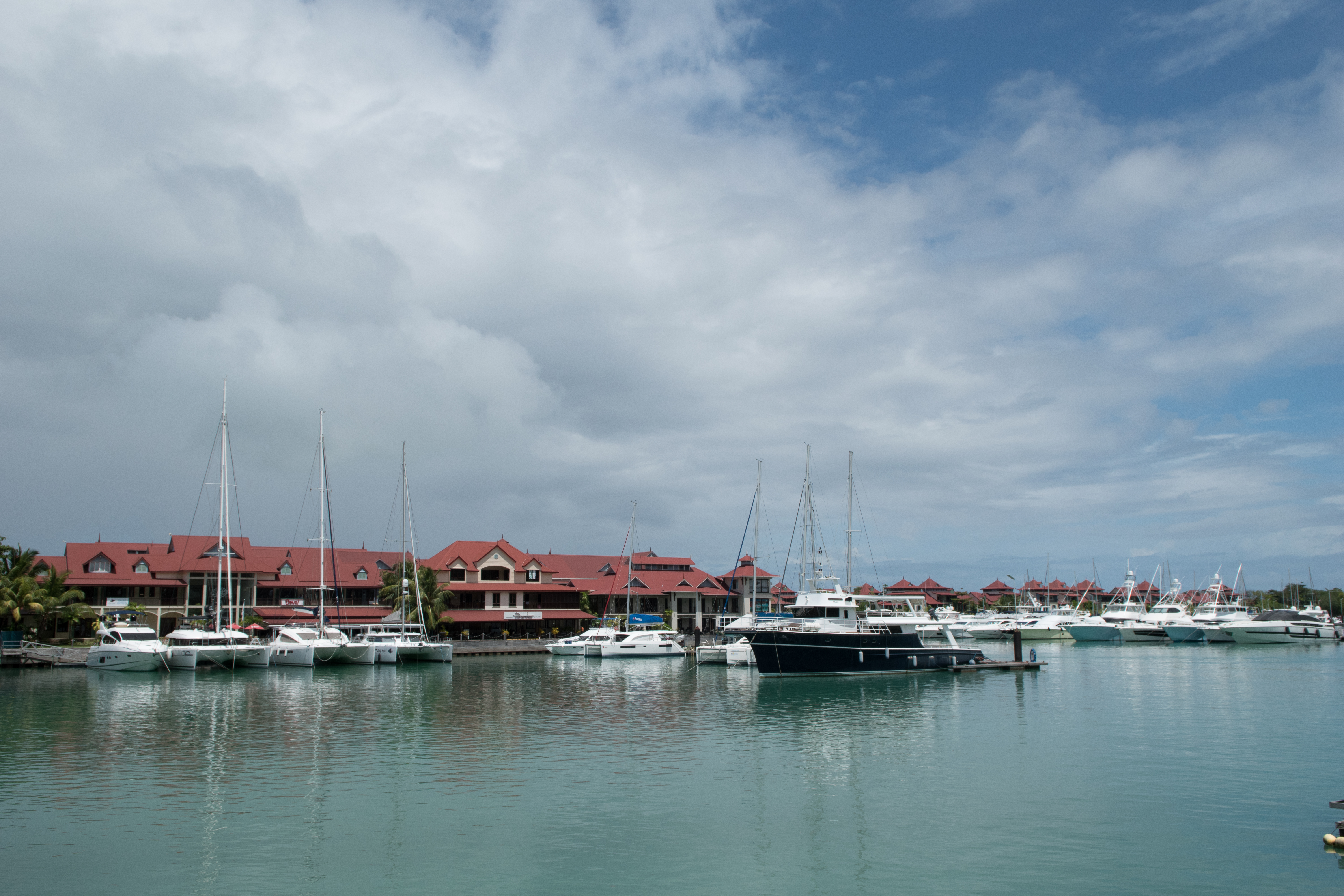 Steuerparadies Eden island Mahe